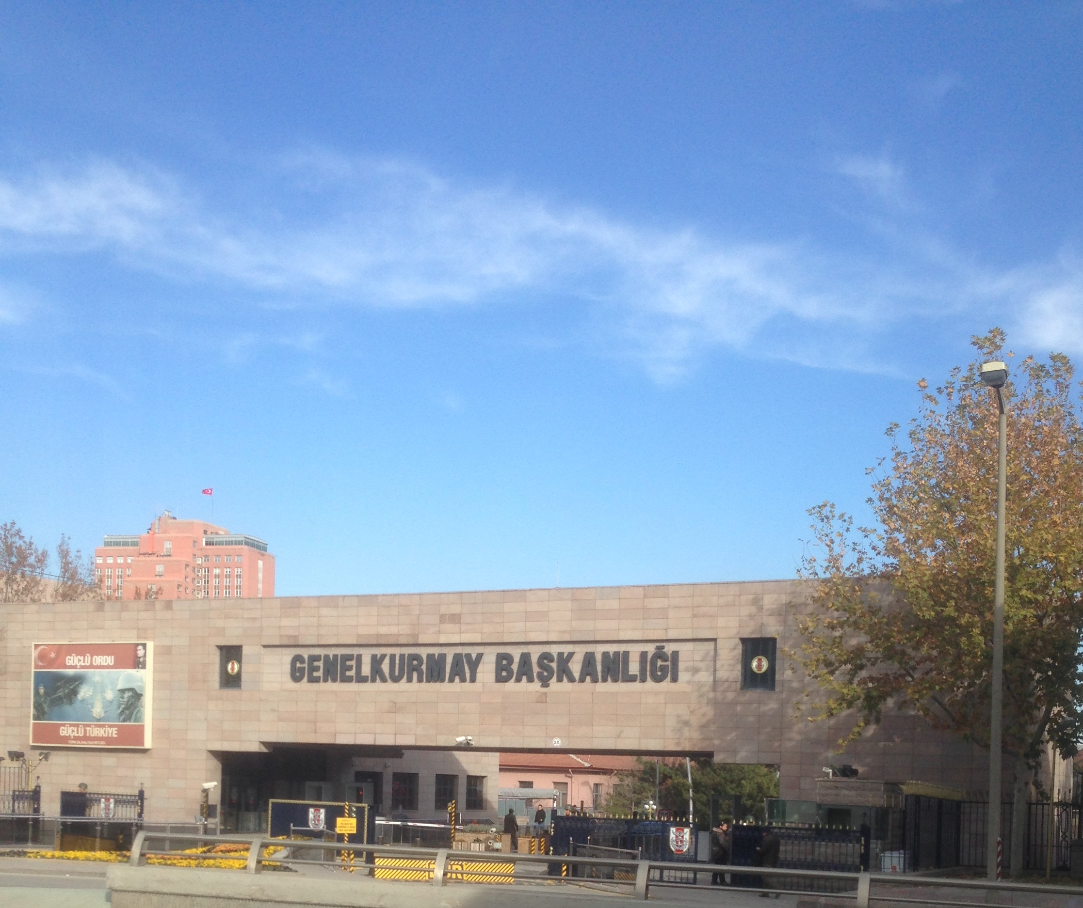 Genelkurmay Başkanlığı Binası, Ankara